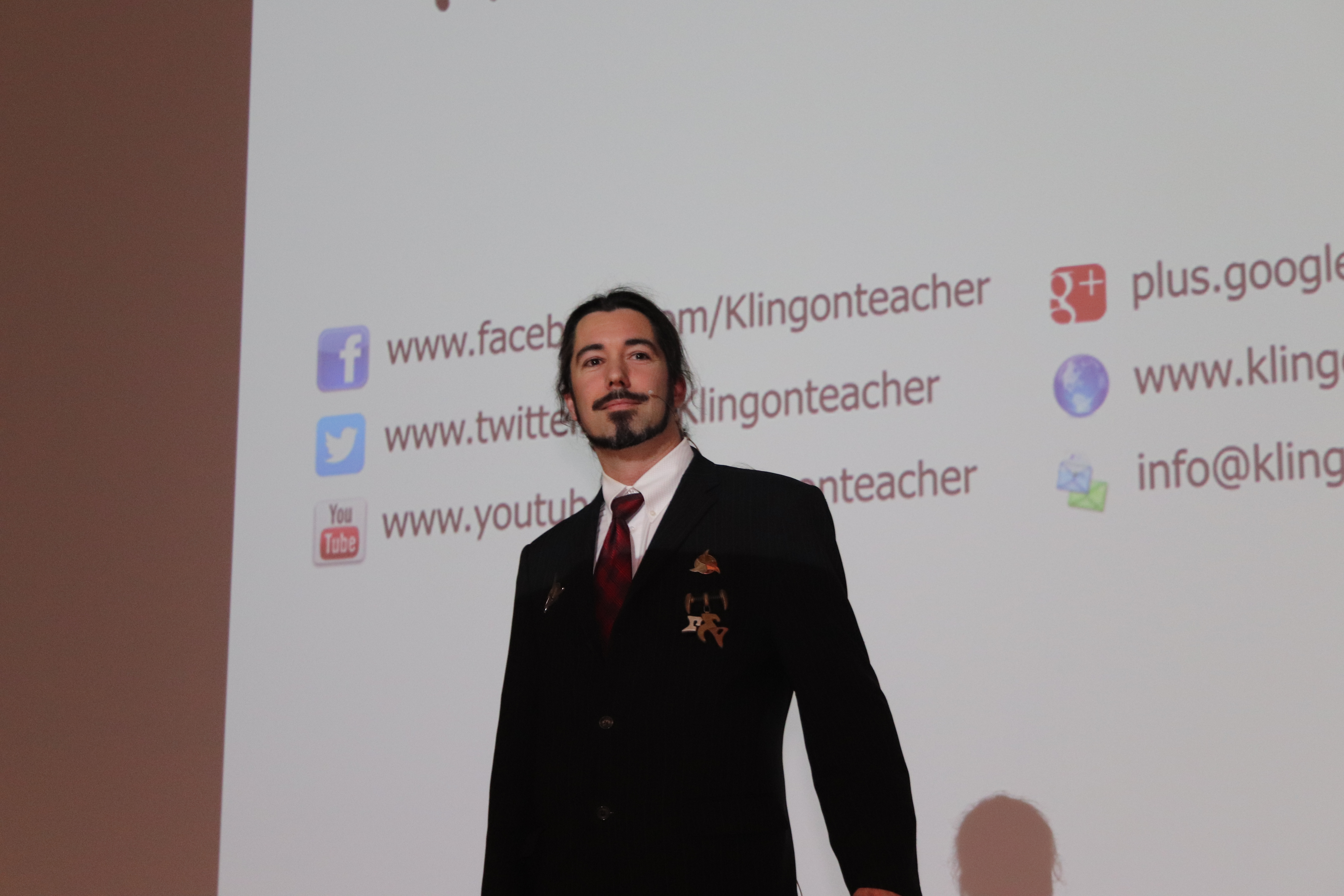 Klingonischlehrer bei der STAR TREK Vorlesung 2017 in Zweibrücken (Foto: Ralf Schmitt)